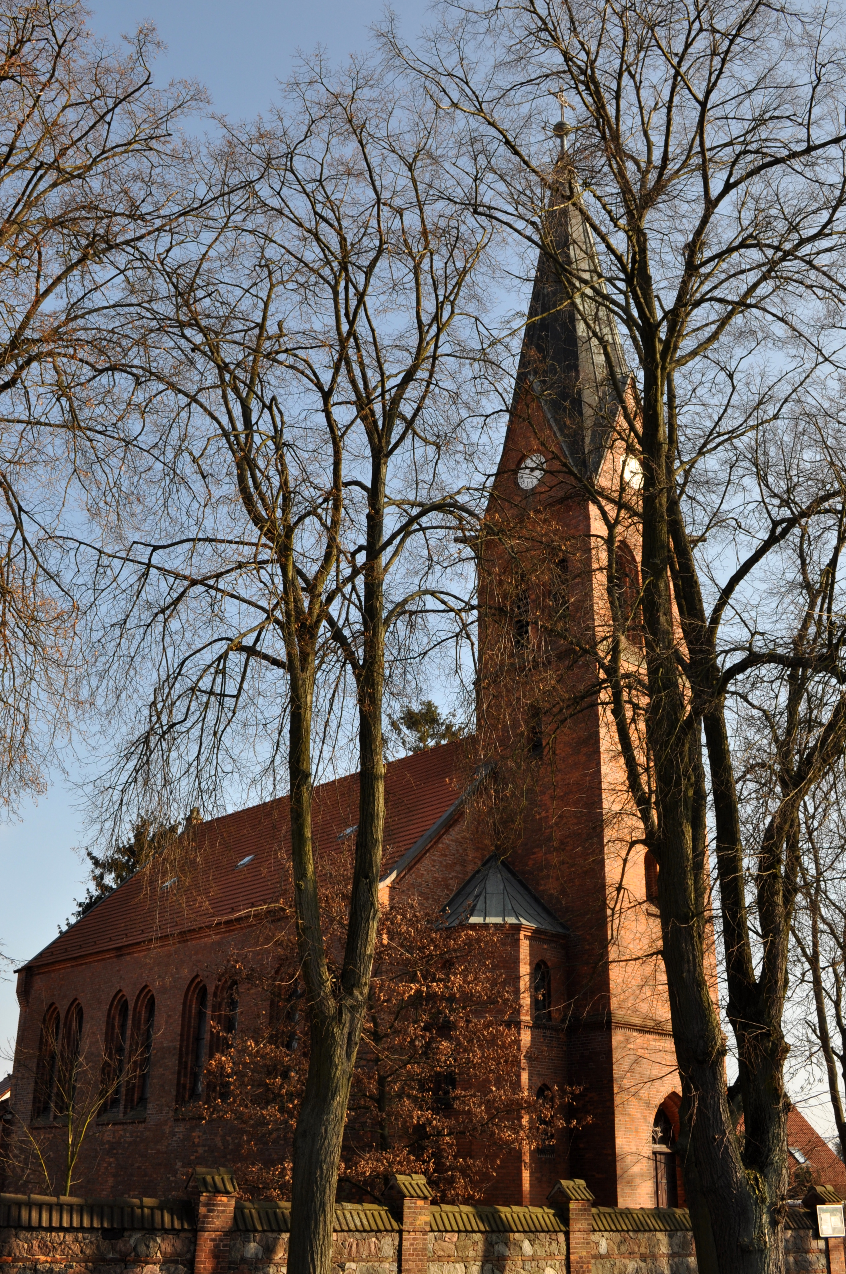 Die Kirche in Finowfurt an der Eberswalder Straße. Sie wurde Ende des 19. Jahrhunderts errichtet und wird von der evangelischen Kirchengemeinde Finow genutzt.